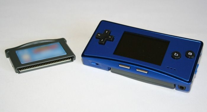 Eigen werk, PD